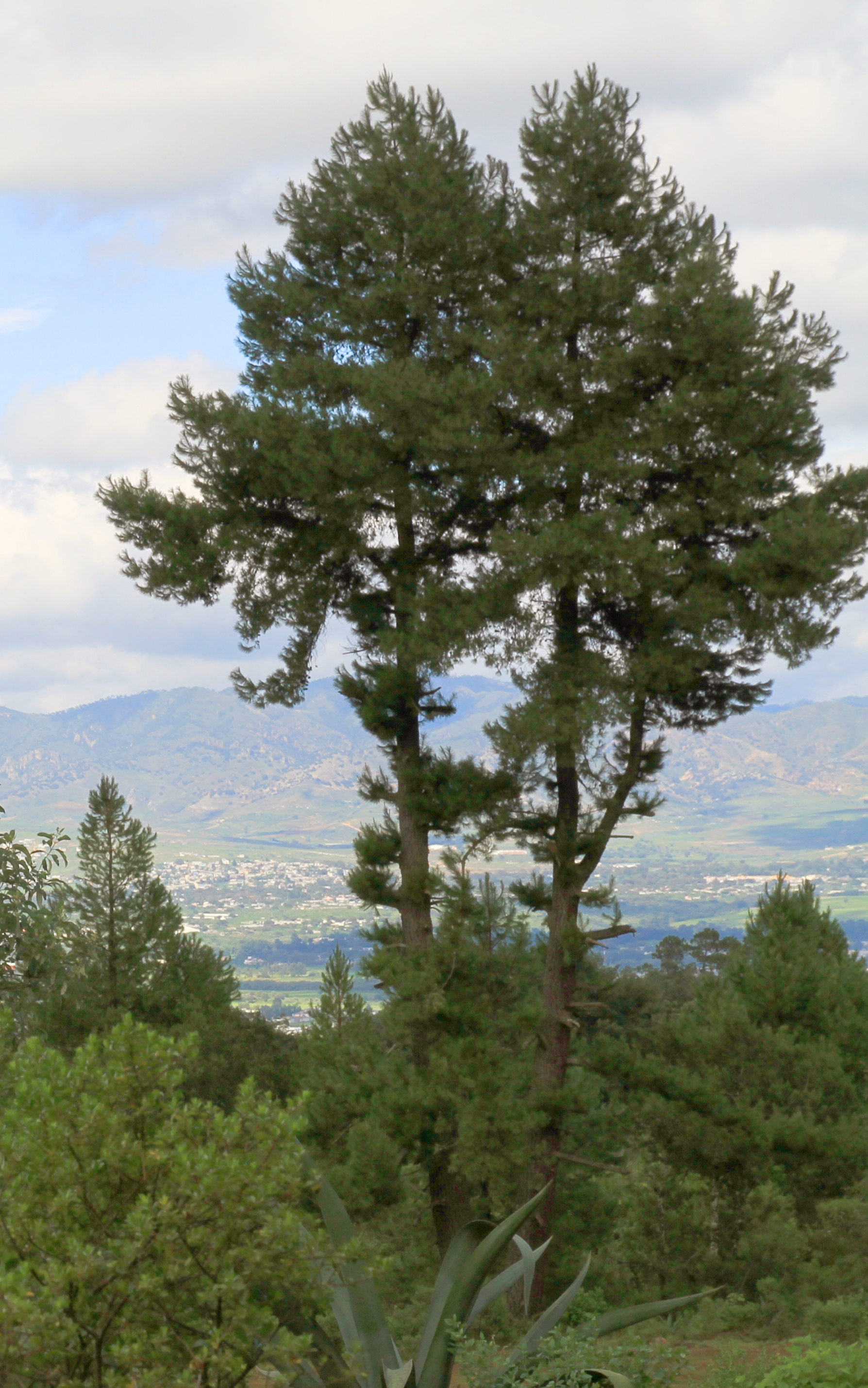 Pinus leiophylla, Tulancingo, Hidalgo, Mexico